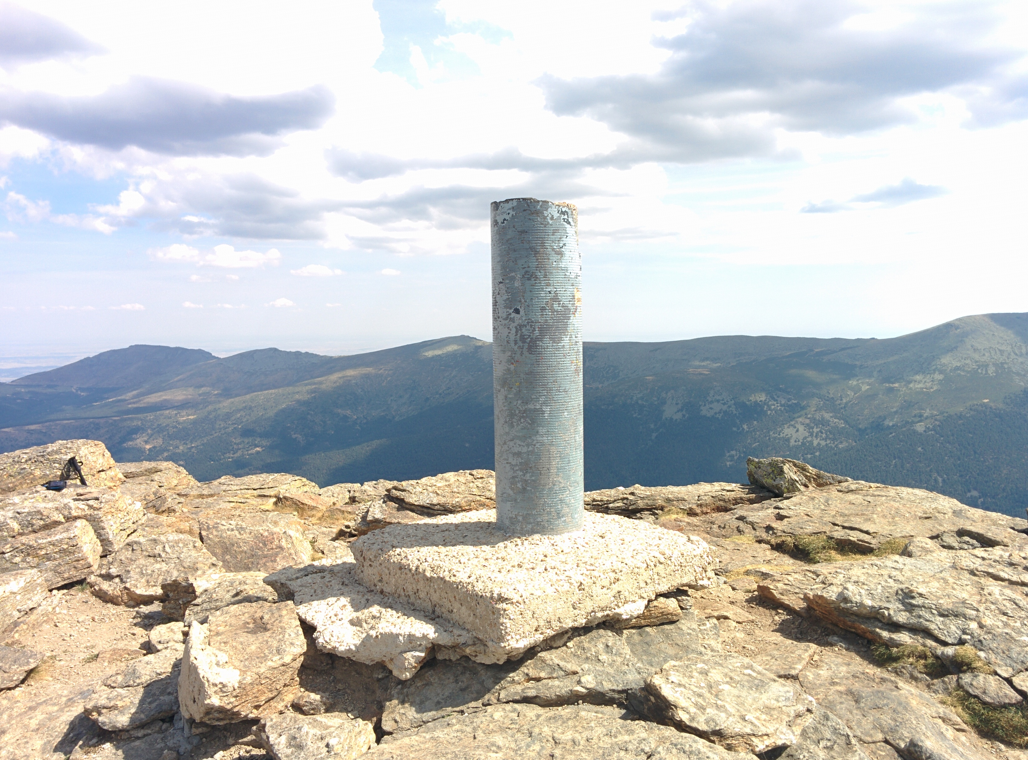 Cima de Peñalara (Segovia-Madrid, España).